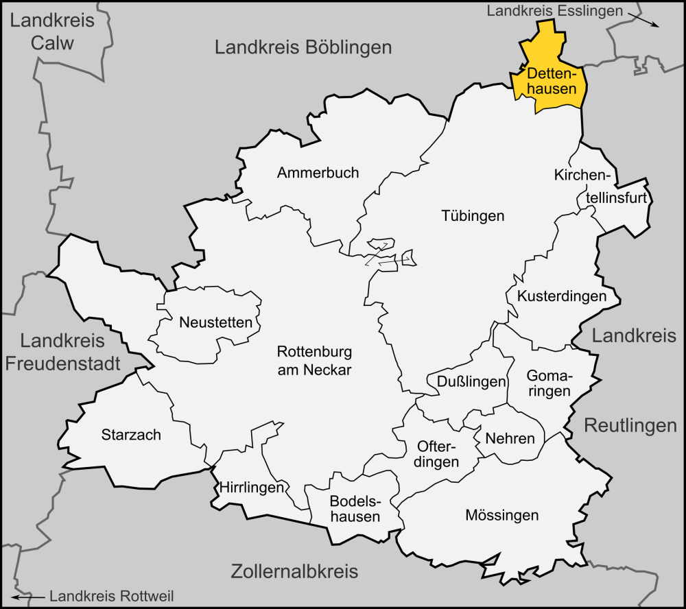 Karte der Gemeinde Dettenhausen im Landkreis Tübingen